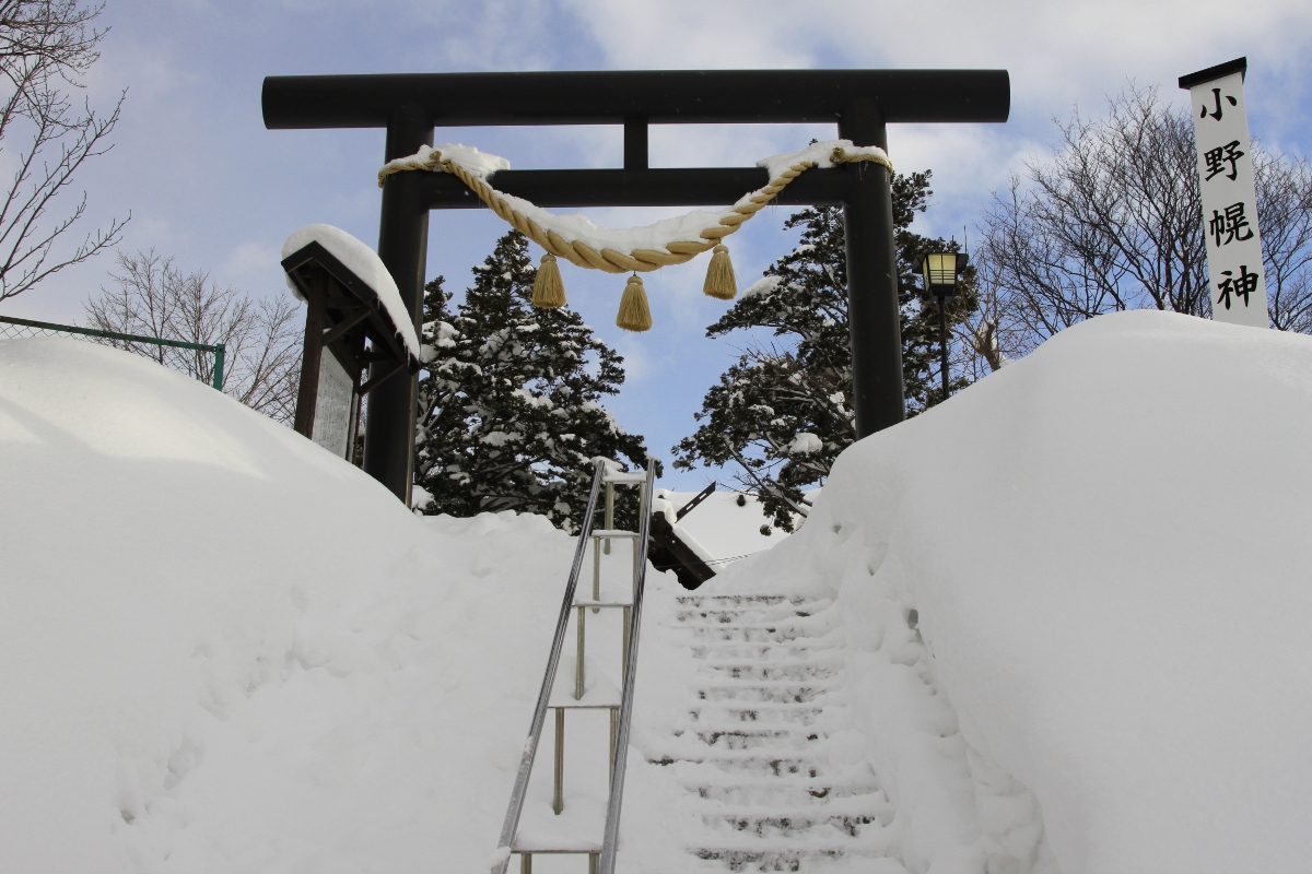 小野幌神社